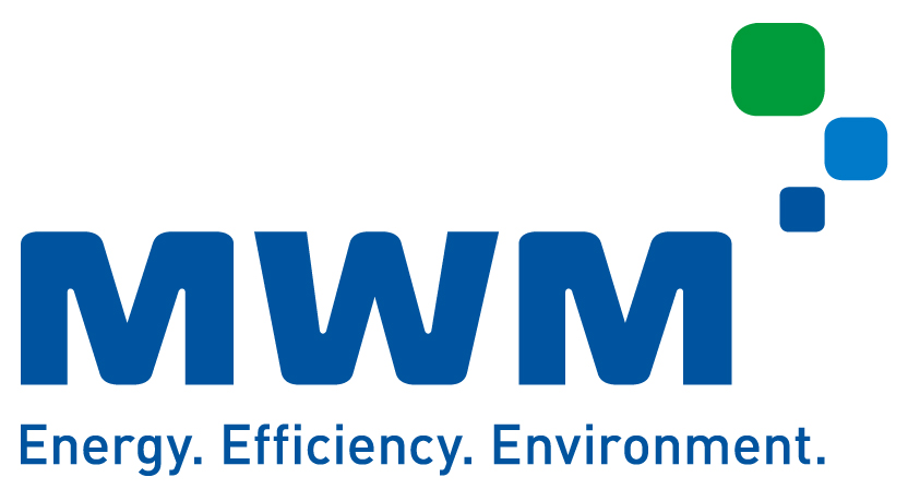 MWM-Logo